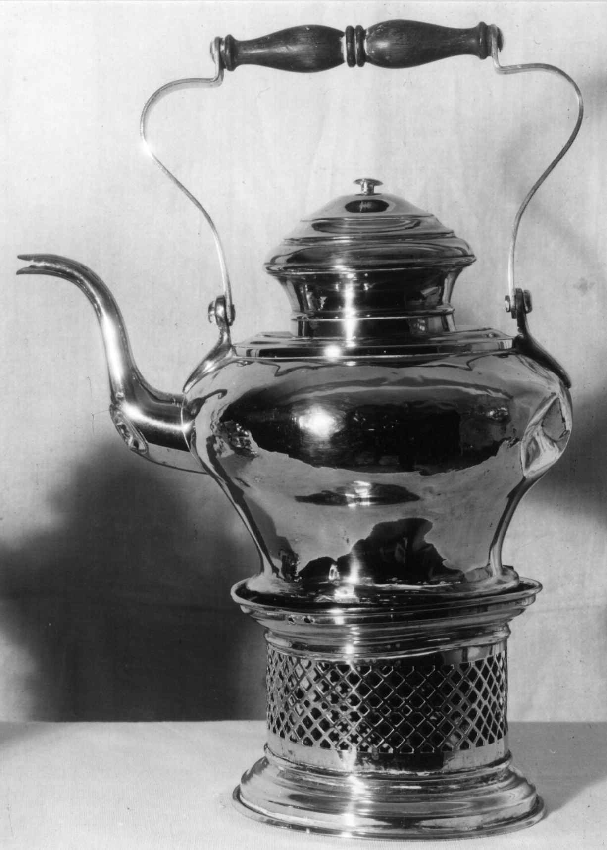 Tevannskjele med fyrfat i messing. Kjelen ble gitt som bryllupsgave i 1868. Foto Norsk Folkemuseum, NF.1939-0759AB